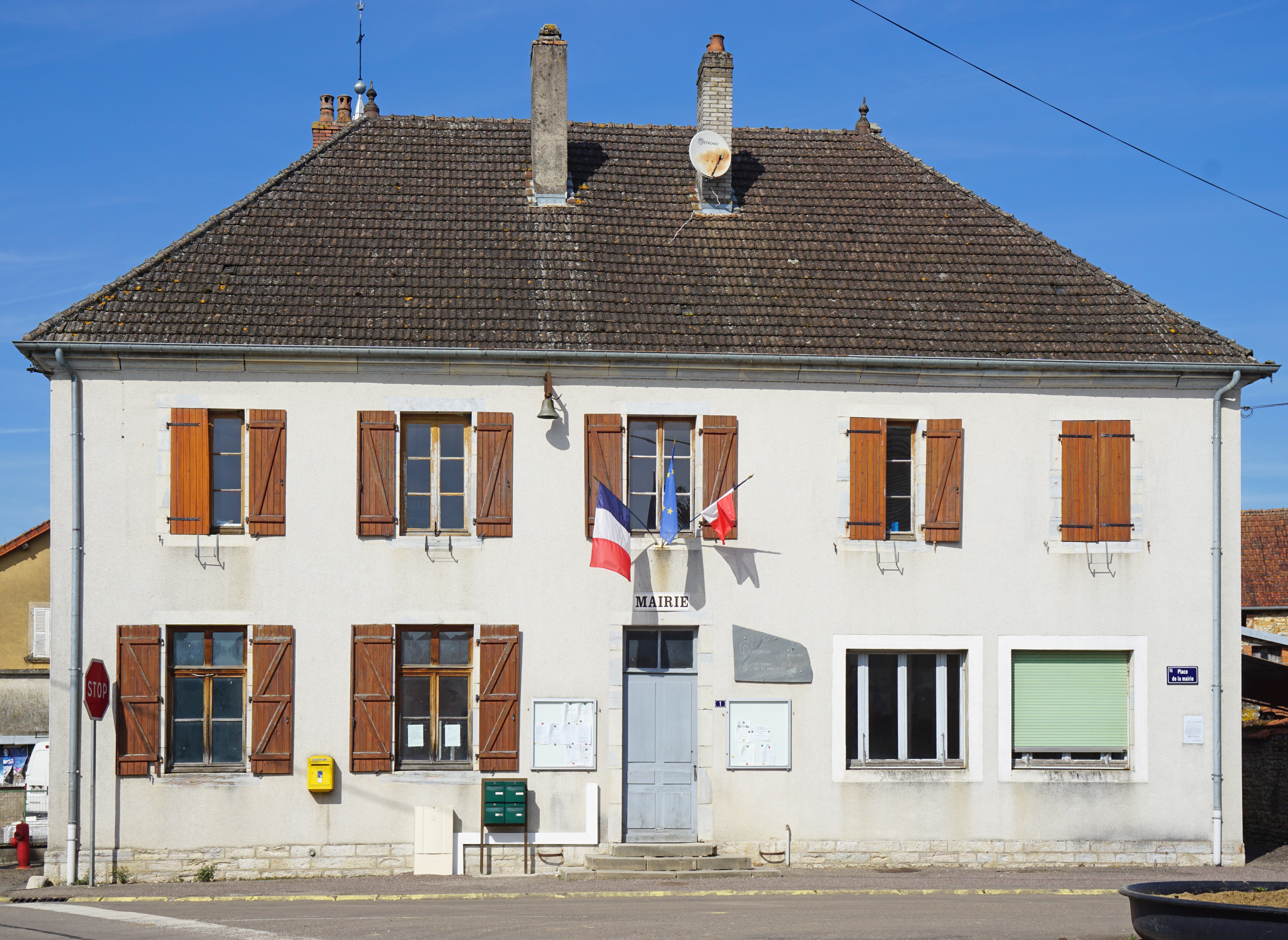 La mairie du Pont-de-Planches devenue mairie de La Romaine.